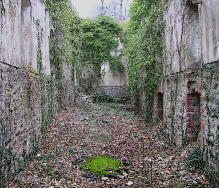 Interno prima del restauro del Forte di Machaby, Arnad, Valle d'Aosta, Italia.